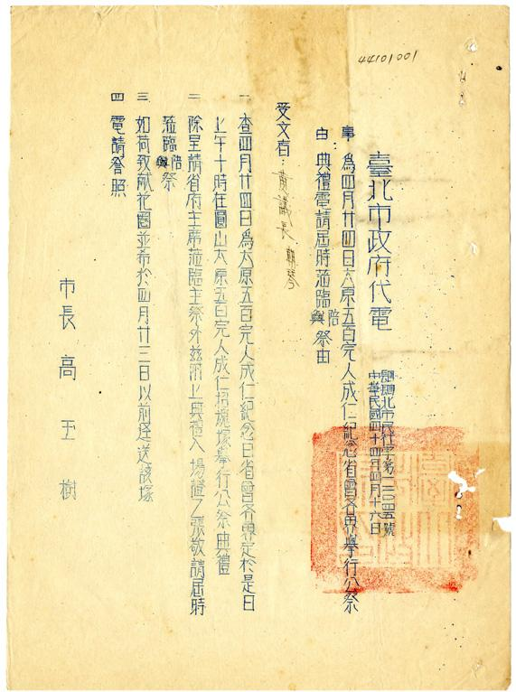 臺北市政府電為44年4月24日太原五百完人成仁紀念，省會各界舉行公祭典禮，請議長黃朝琴蒞臨陪祭案。